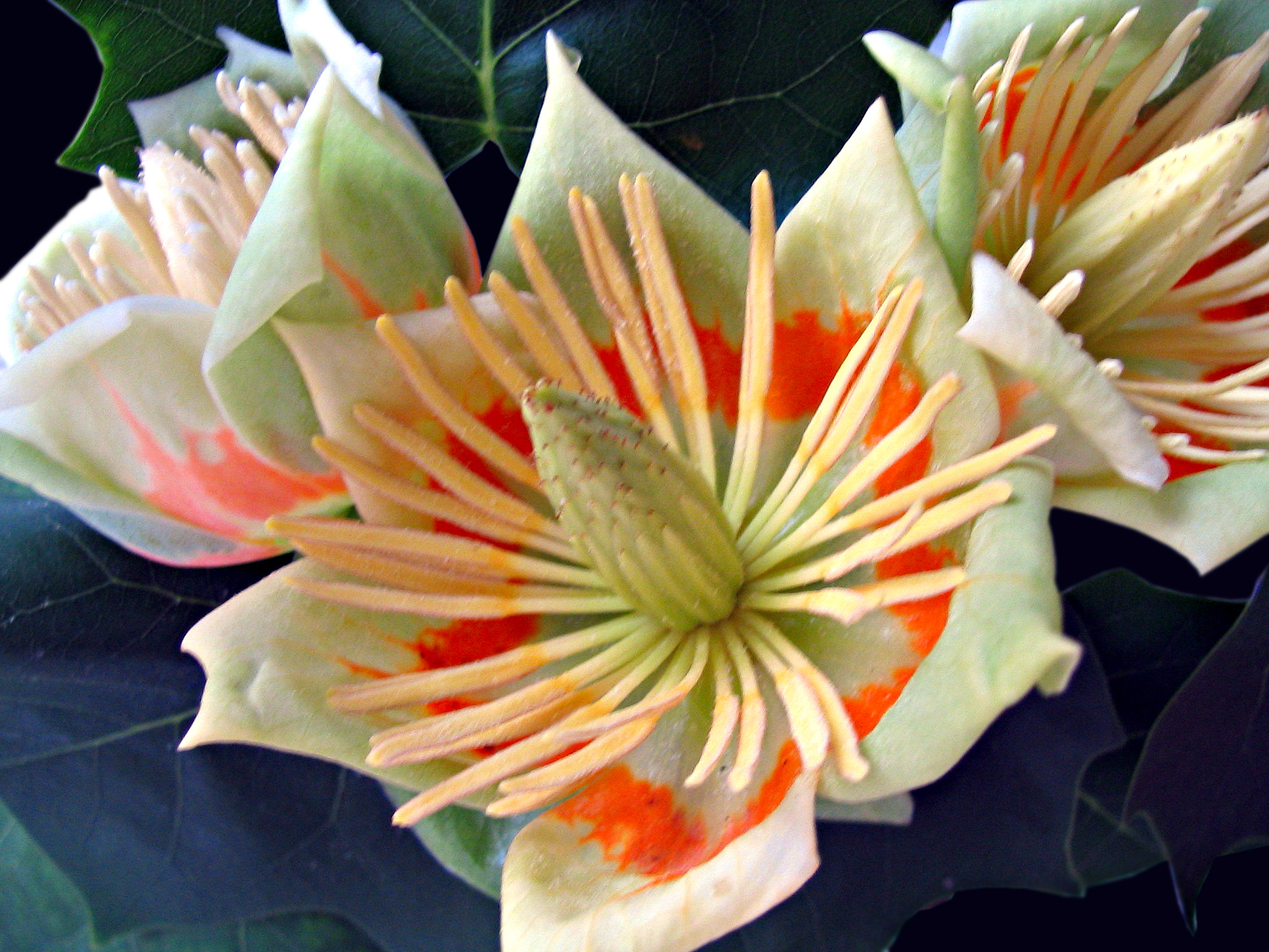 Цветови лалиног дрвета (аутор: Михаило Грбић)